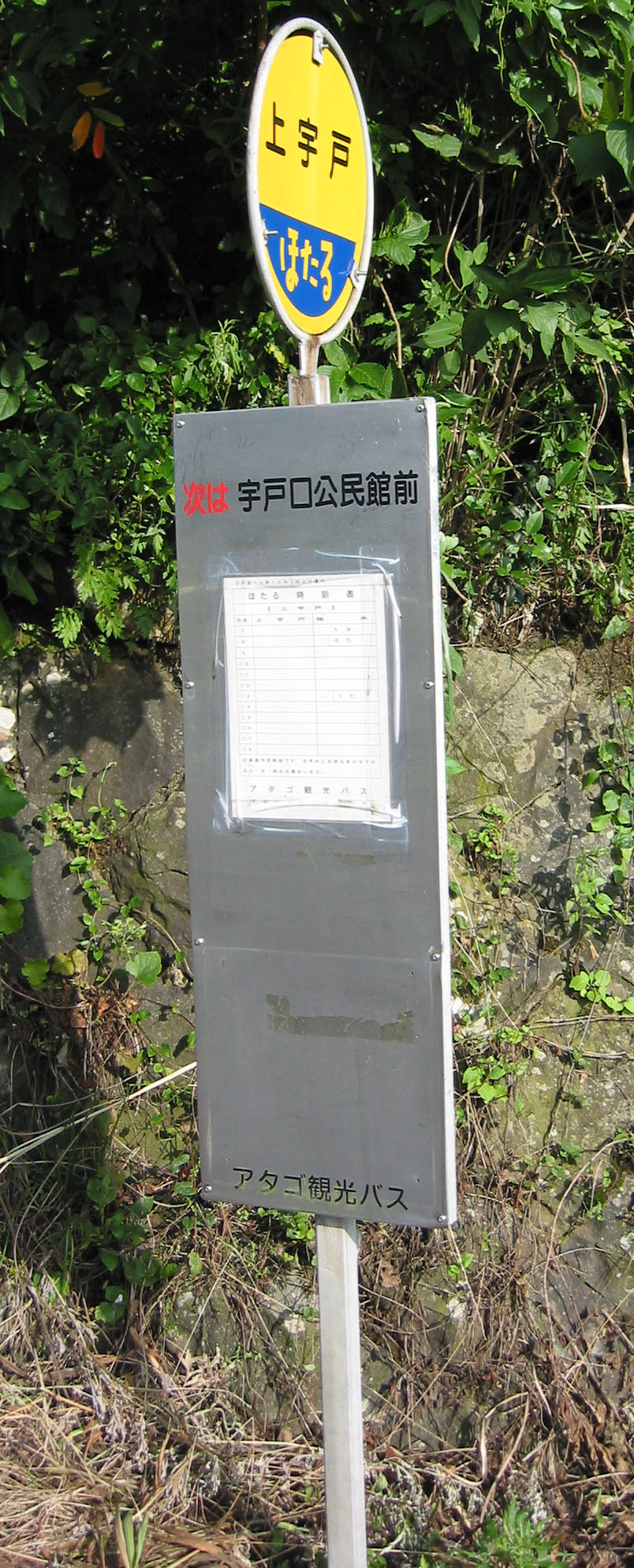 アタゴ商事（アタゴ観光バス） 路線バスのバス停